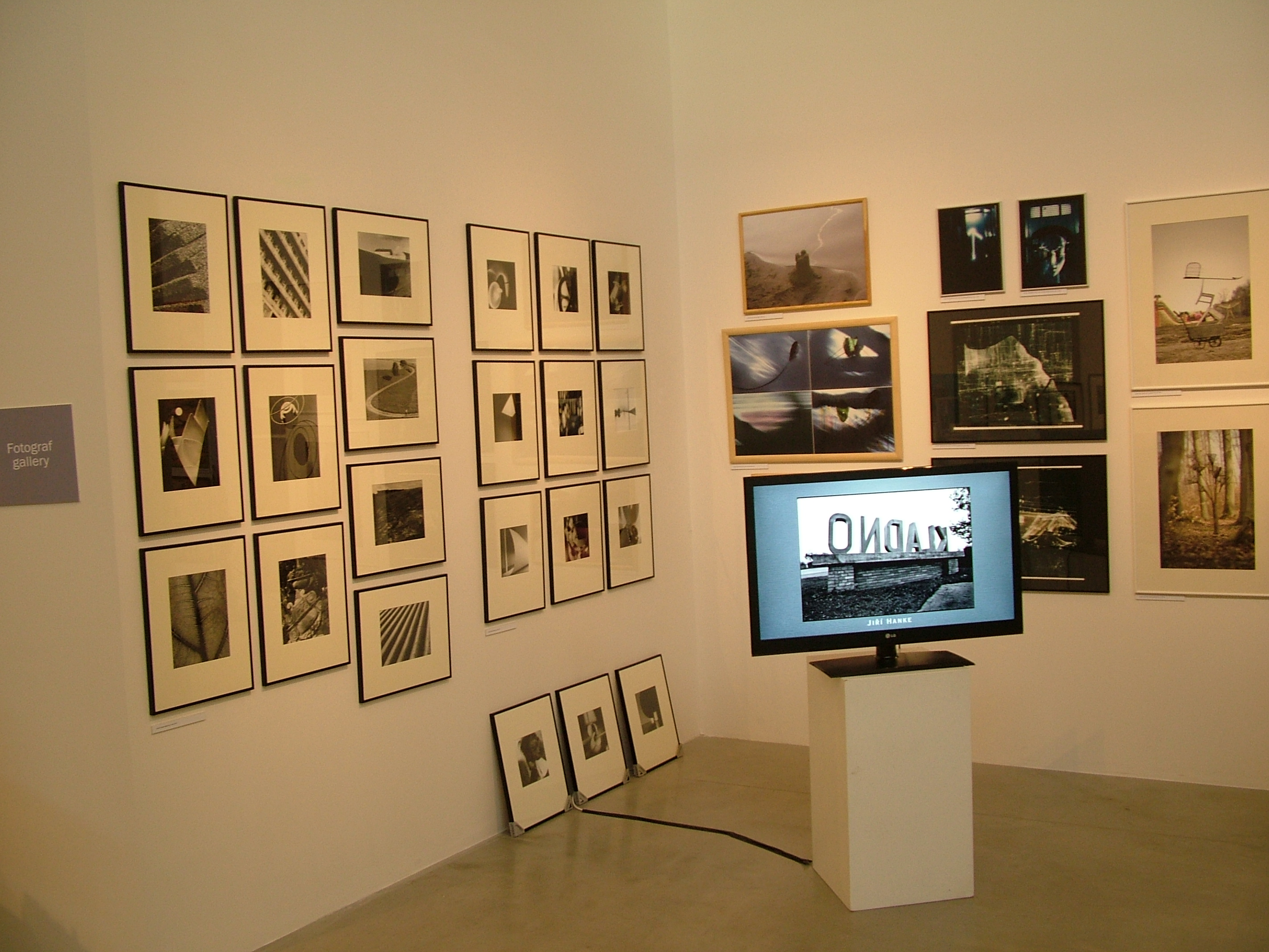 Prague Photo Festival 2012